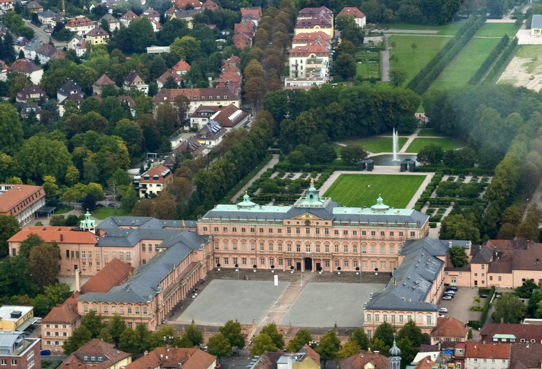 Das Rastatter Schloss. Ein ehemaliges Residenzschloss der Markgrafen von Baden-Baden. Es wurde um 1700 vom italienischen Hofbaumeister Domenico Egidio Rossi erbaut.